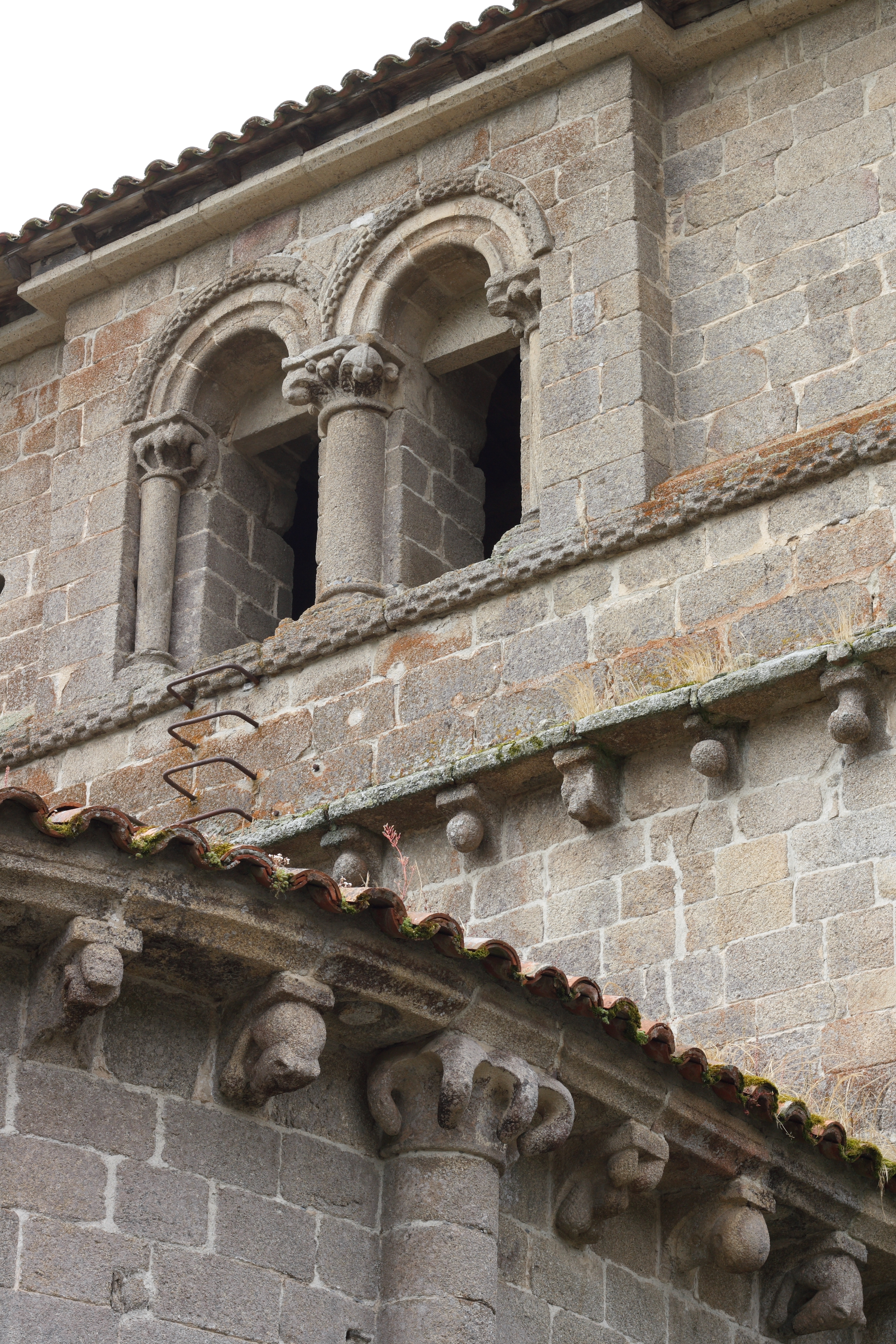 Katholische Pfarrkirche San Miguel in Eiré (Pantón) in der spanischen Provinz Lugo (Galicien), Zwillingsfenster am Turm, Kragsteine